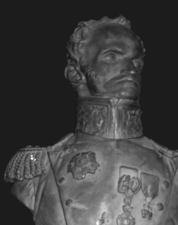 Buste en marbre du Général Dumoustier, vers 1810, collection particulière, France.